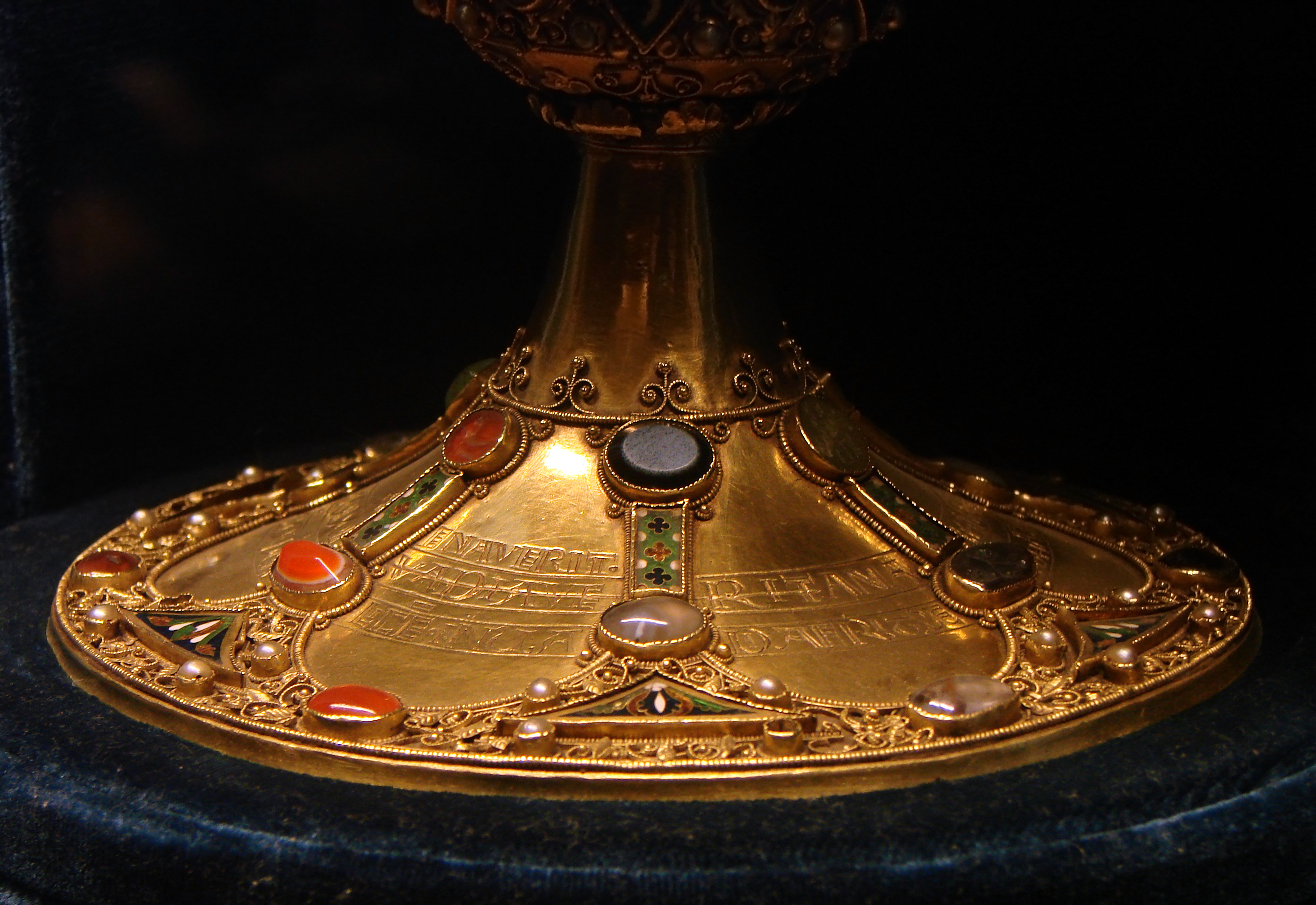 Calice du sacre,fin du XIIème siècle,Palais du Tau,Trésor de la cathédrale de Reims: détail. Or (travail de filigrane et granulations ), émaux, perles, pierres fines et pierres précieuses. Il fut envoyé à la fonte à la Monnaie de Paris et heureusement oublié, puis exposé au Musée des Antiques de la Bibliothèque Nationale à Paris. Il fut renvoyé à Reims en 1861, sous Napoléon III. L'intaille de gauche, sur cornaline, représente le capricorne. Le pied du calice porte l'inscription: Quicumque hunc calicem invadiaverit vel ab ecclesia remensi aliqui modo alianeverit anathema sit fait amen ( quiconque s'emparera de ce calice de l'église de Reims de quelque façon que ce soit, qu'il soit frappé d'anathème Amen ).